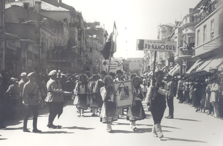 4-ти селскостопански културен и национален събор, 28 - 29 август 1938 г., гр. Варна. Парад на участниците в събора по ул. Княз Борис І. На преден план са представителите на община Цар Калоян.